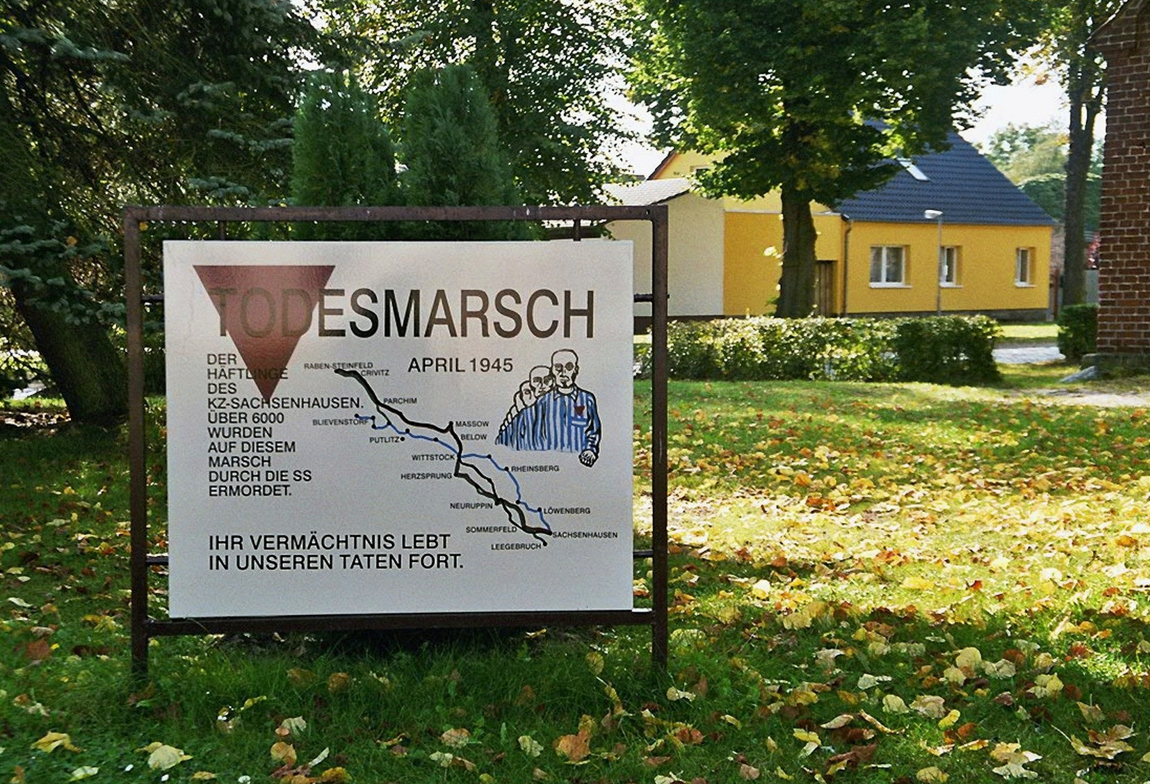 Source: made by WikiTour 2005 Description: Löwenberger Land-Nassenheide: Gedenktafel für den Todesmarsch der Häftlinge des KZ Sachsenhausen (1976 aufgestellt, später erneuert) an der Dorfkirche